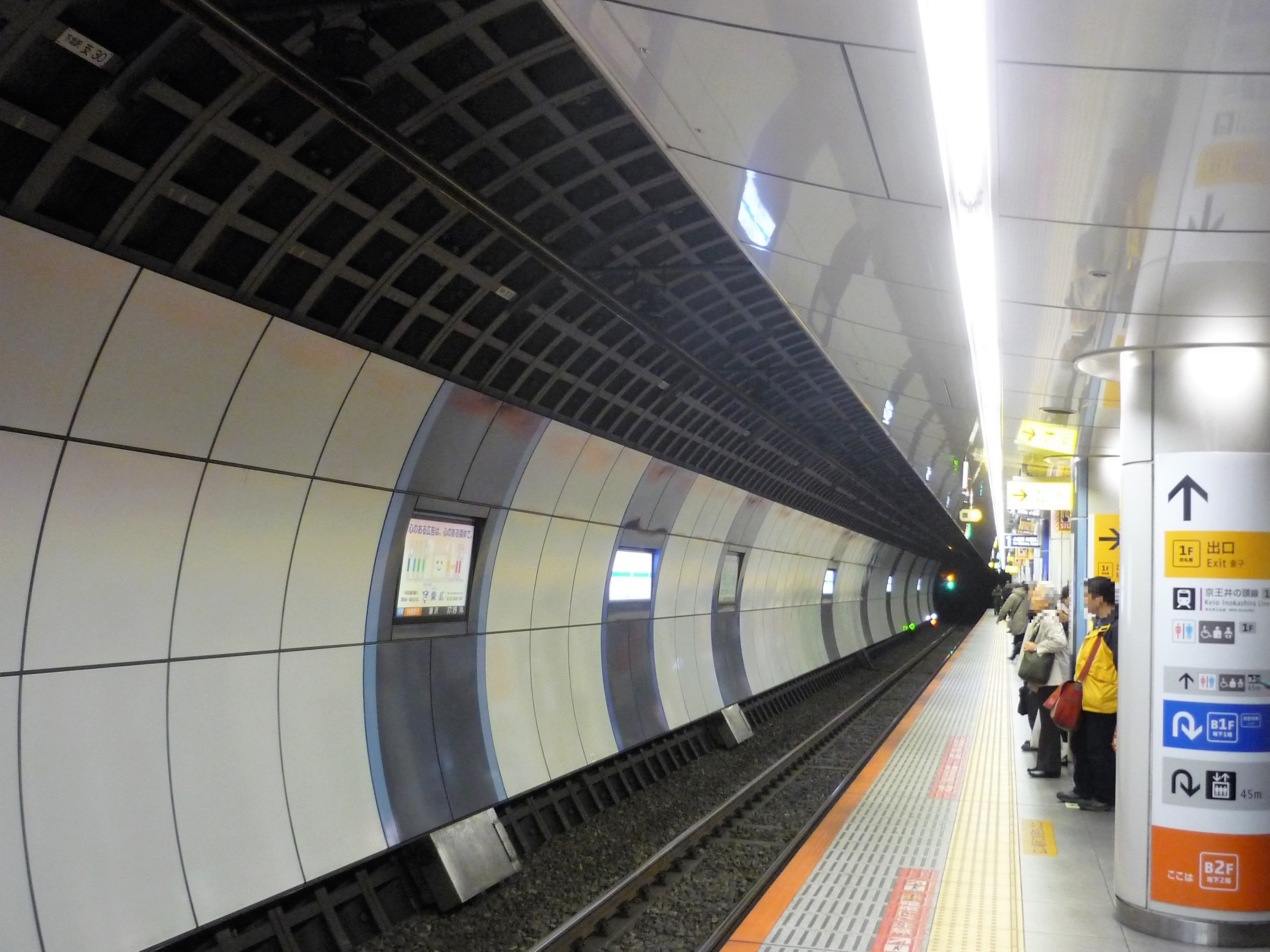 複々線化後の下北沢駅地下3階ホーム1番線（2018年3月）